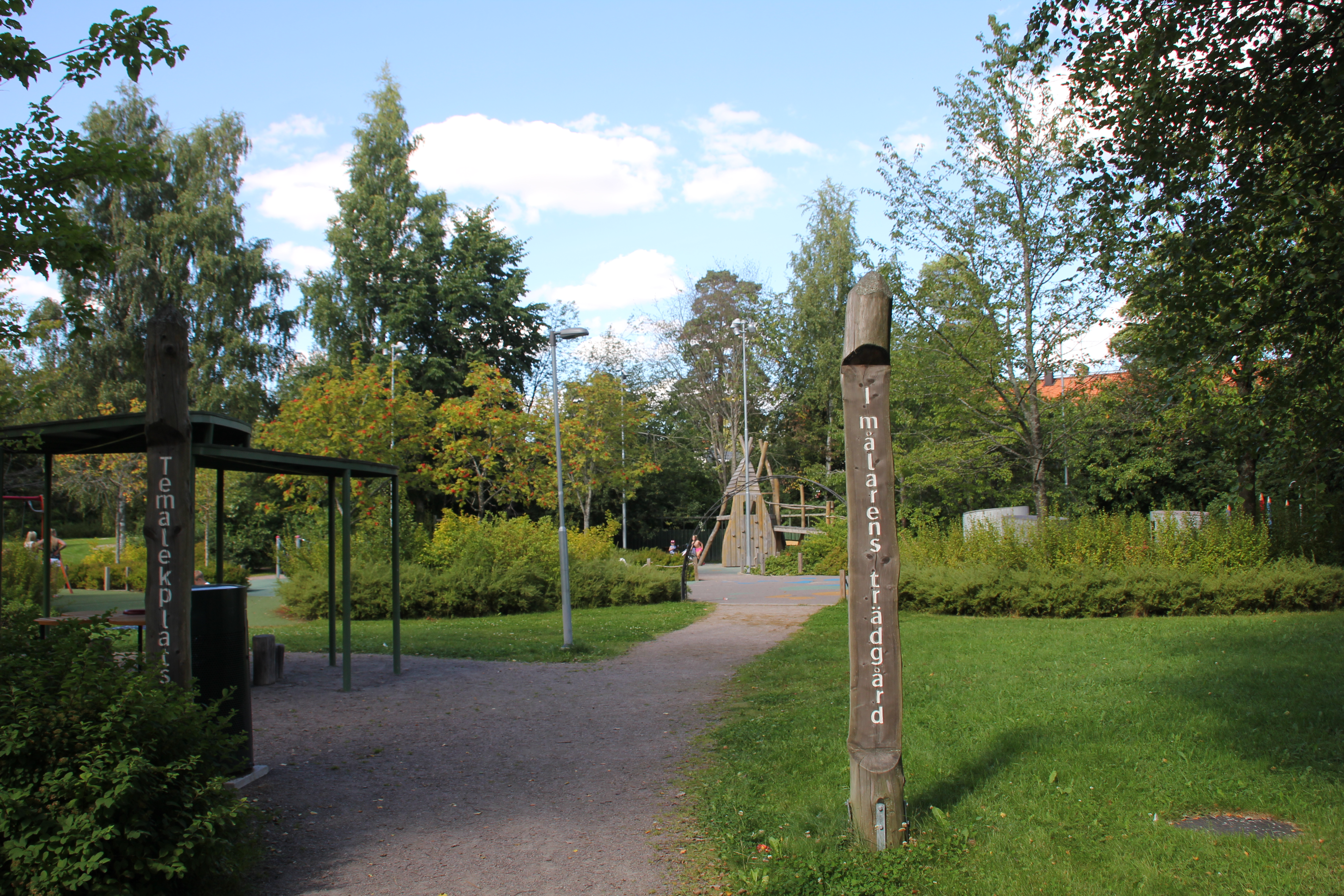 Murkelparken, entre 2016